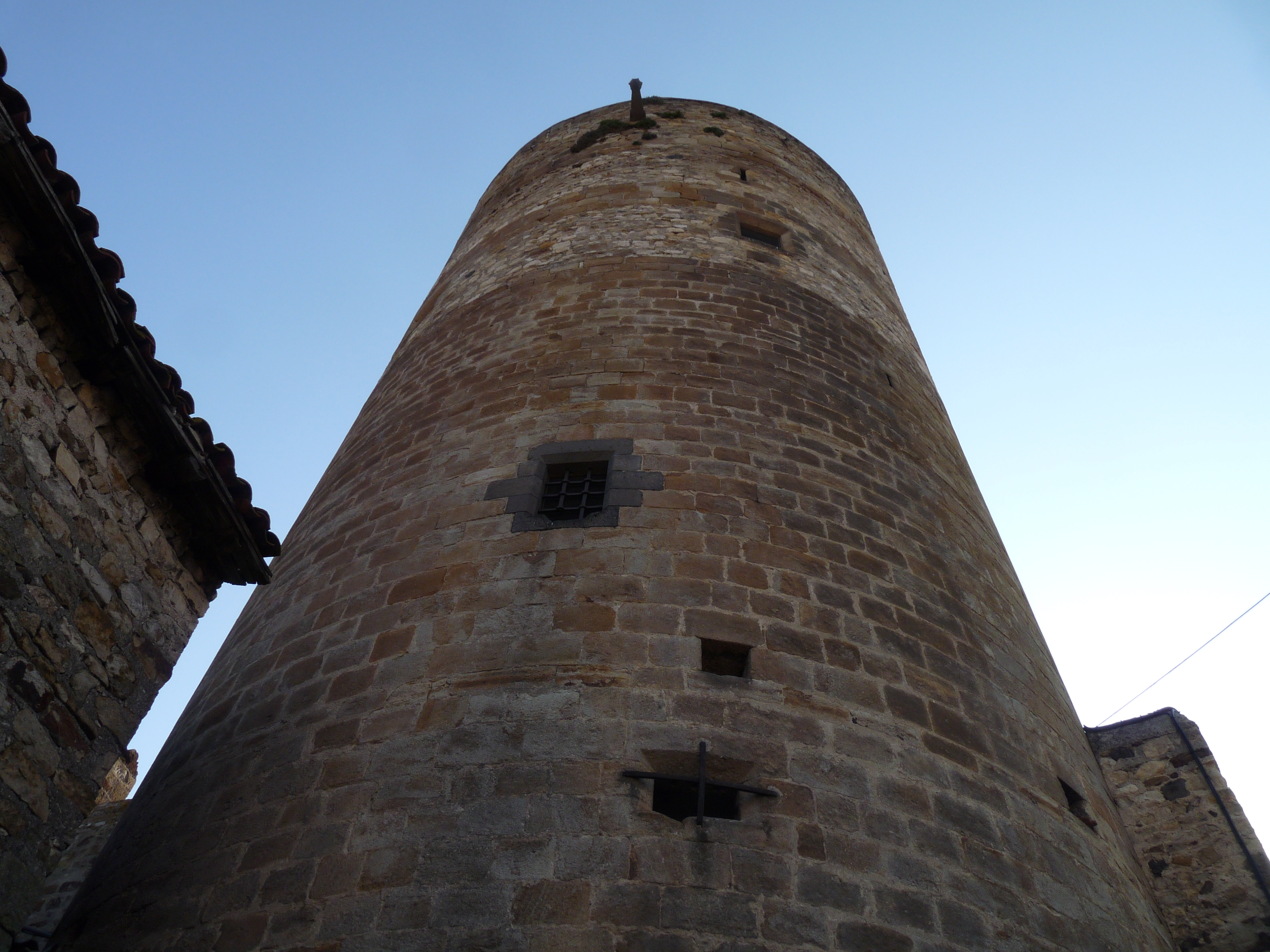 la tour de la Sauvetat, Puy de Dome